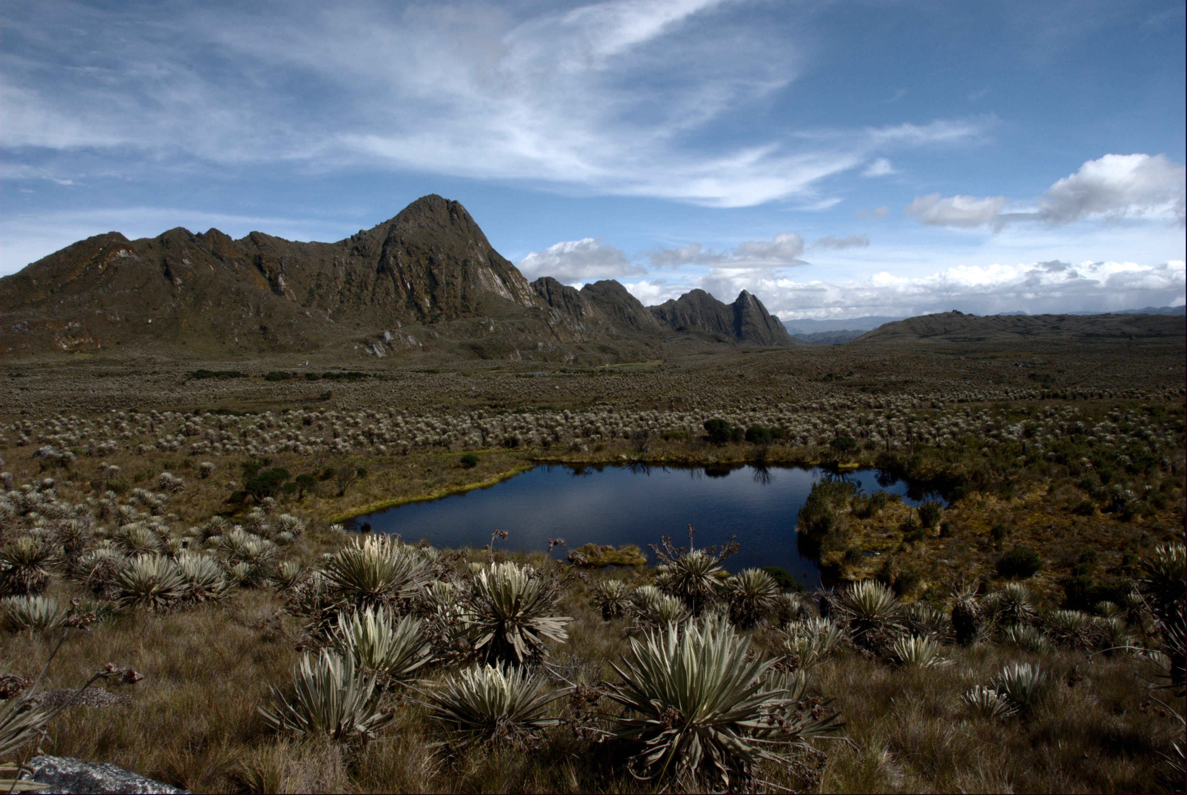 Páramo de Sumapaz, Colombia